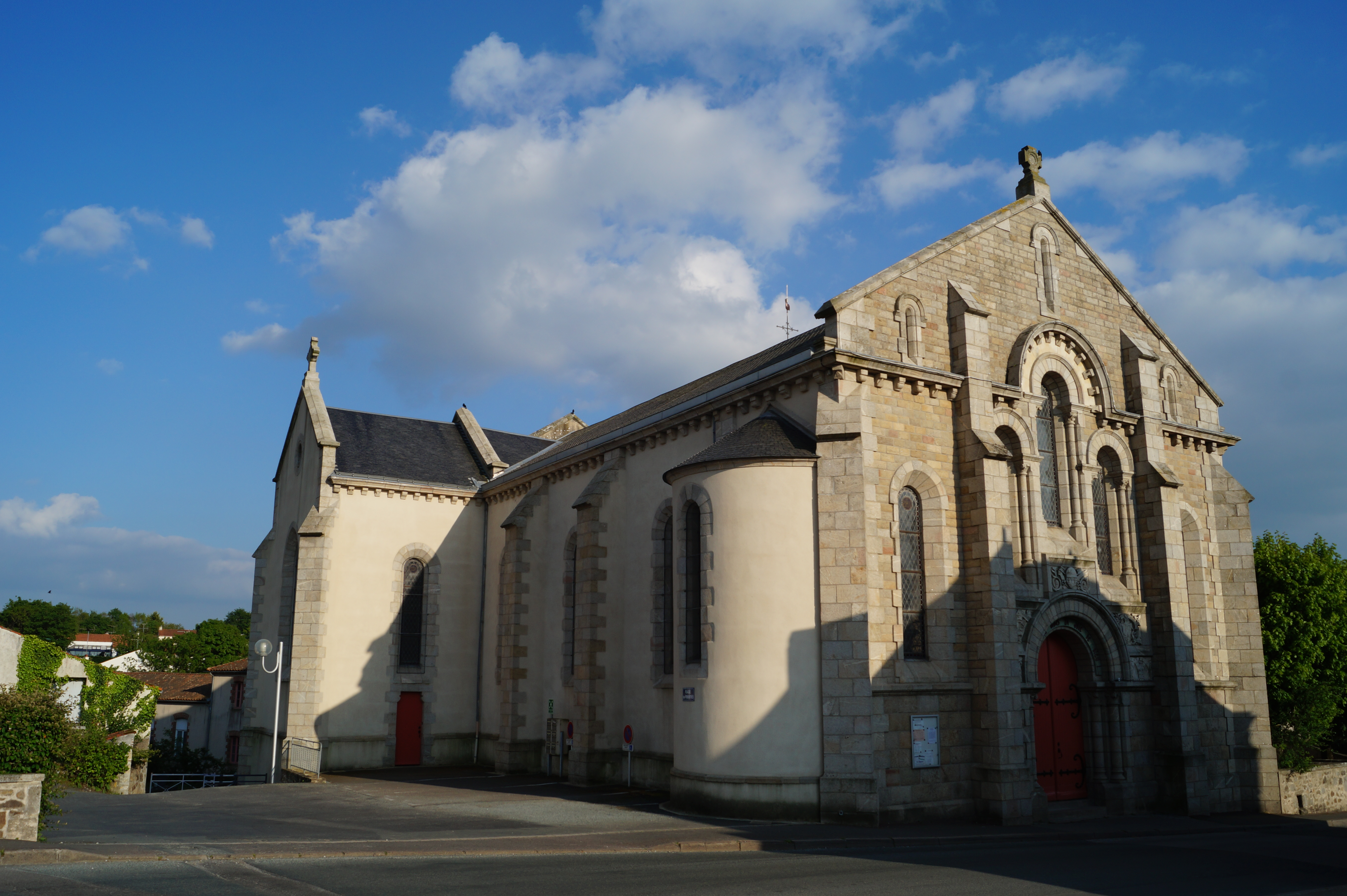 L’église Saint-Pierre de Venansault.